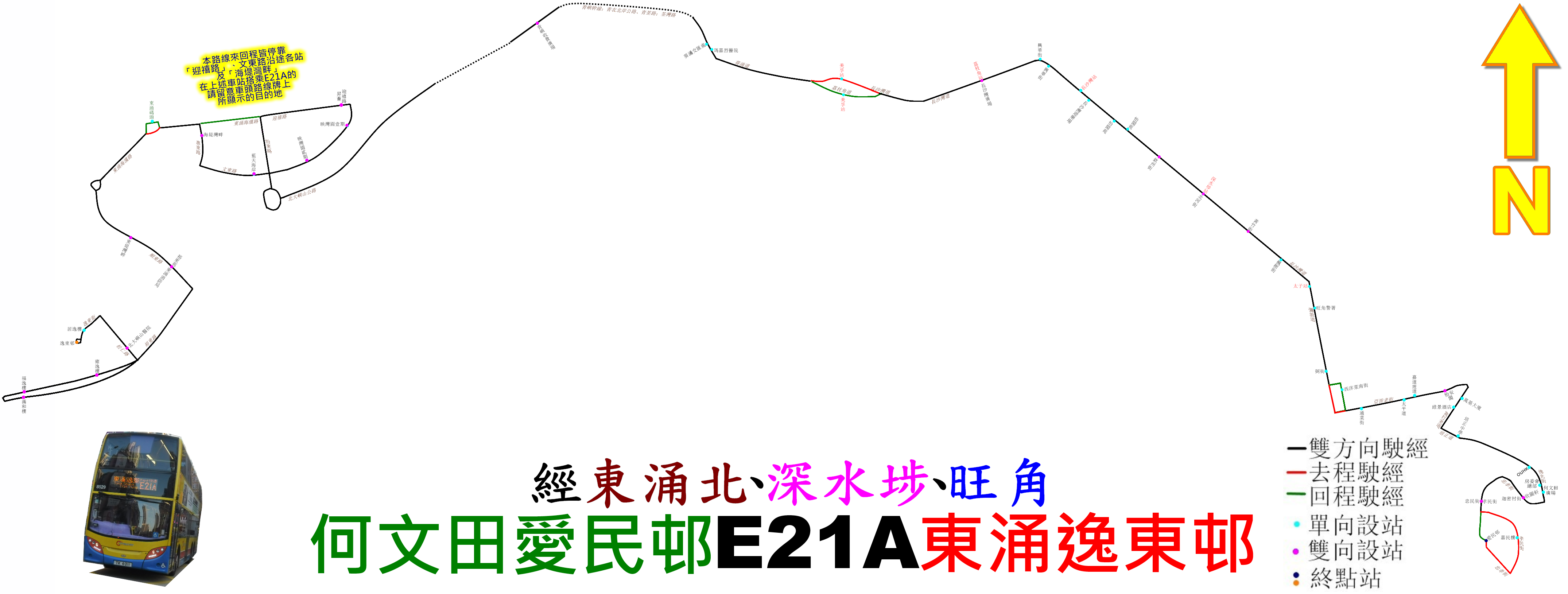 中文（香港）: 城巴E21A線的走線圖